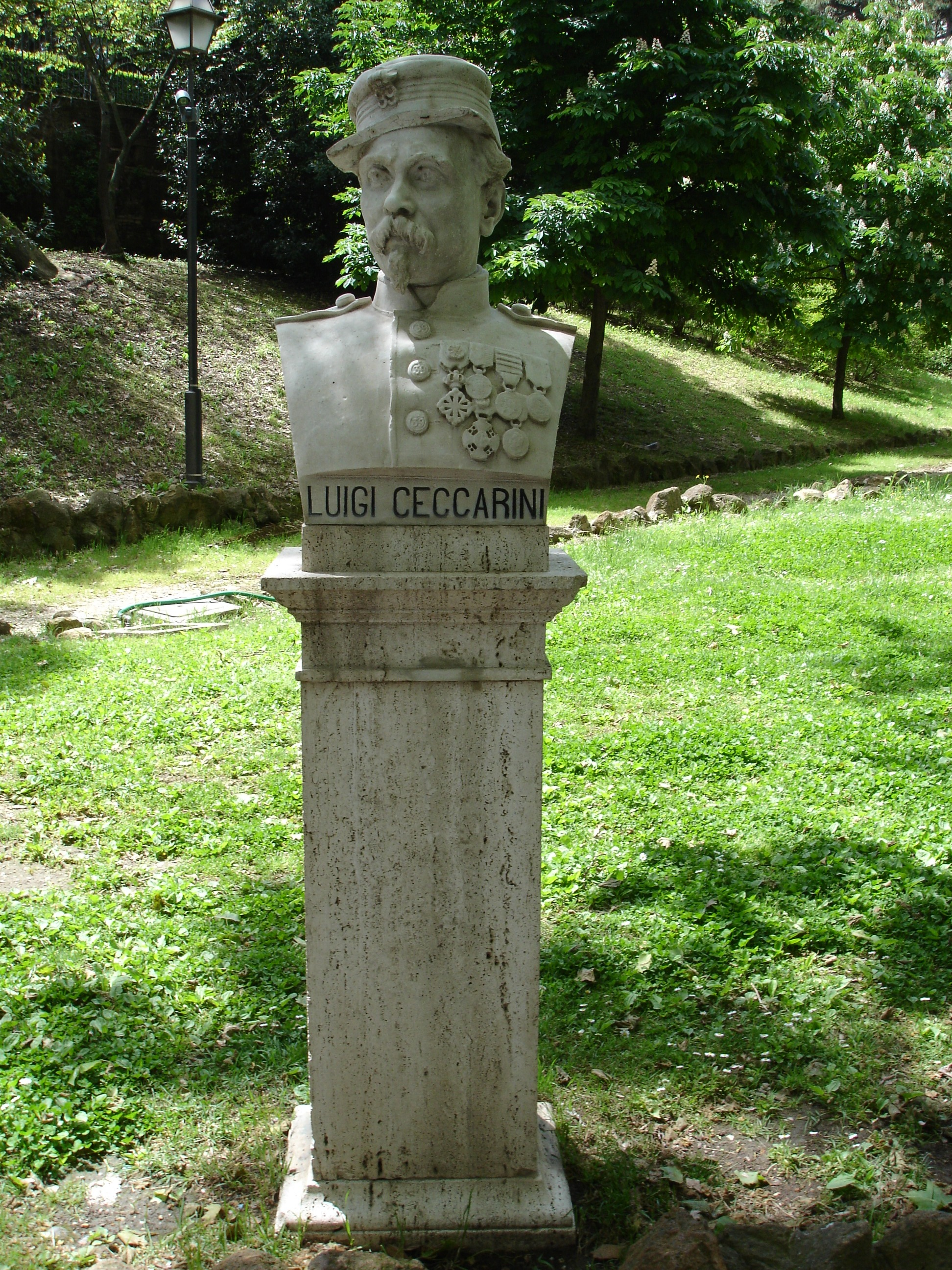 Busto di Luigi Ceccarini sul Gianicolo, a Roma. Fu scolpito da Giuseppe Trabacchi (1839-1909) nel 1896. Foto scattata da F. Fullone. Original uploader was Fullo88 at it.wikipedia.